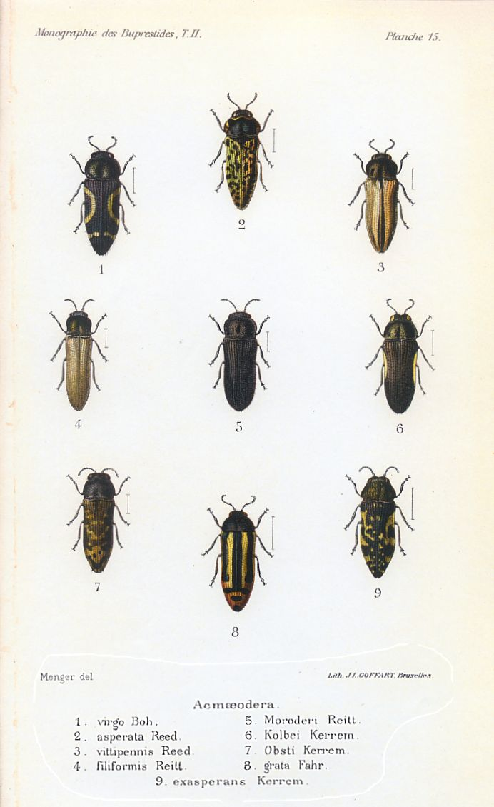 Acmæodera virgo Boh. = Acmaeodera virgo Boheman, 1860 Acmæodera asperata Reed. = Atacamita chiliensis (Laporte & Gory, 1835) Acmæodera vittipennis Reed. = Atacamita biimpressa (Philippi & Philippi, 1860) Acmæodera filiformis Reitt. = Acmaeoderella filiformis (Reitter, 1904) Acmæodera Moroderi Reitt. = Acmaeoderella moroderi (Reitter, 1906) Acmæodera Kolbei Kerrem. = Acmaeodera kolbei Kerremans, 1907 Acmæodera Obsti Kerrem. = Acmaeodera obsti Kerremans, 1907 Acmæodera grata Fahr. = Acmaeodera grata Fåhraeus in Boheman, 1851 Acmæodera exasperans Kerrem. = Acmaeodera exasperans Kerremans, 1907